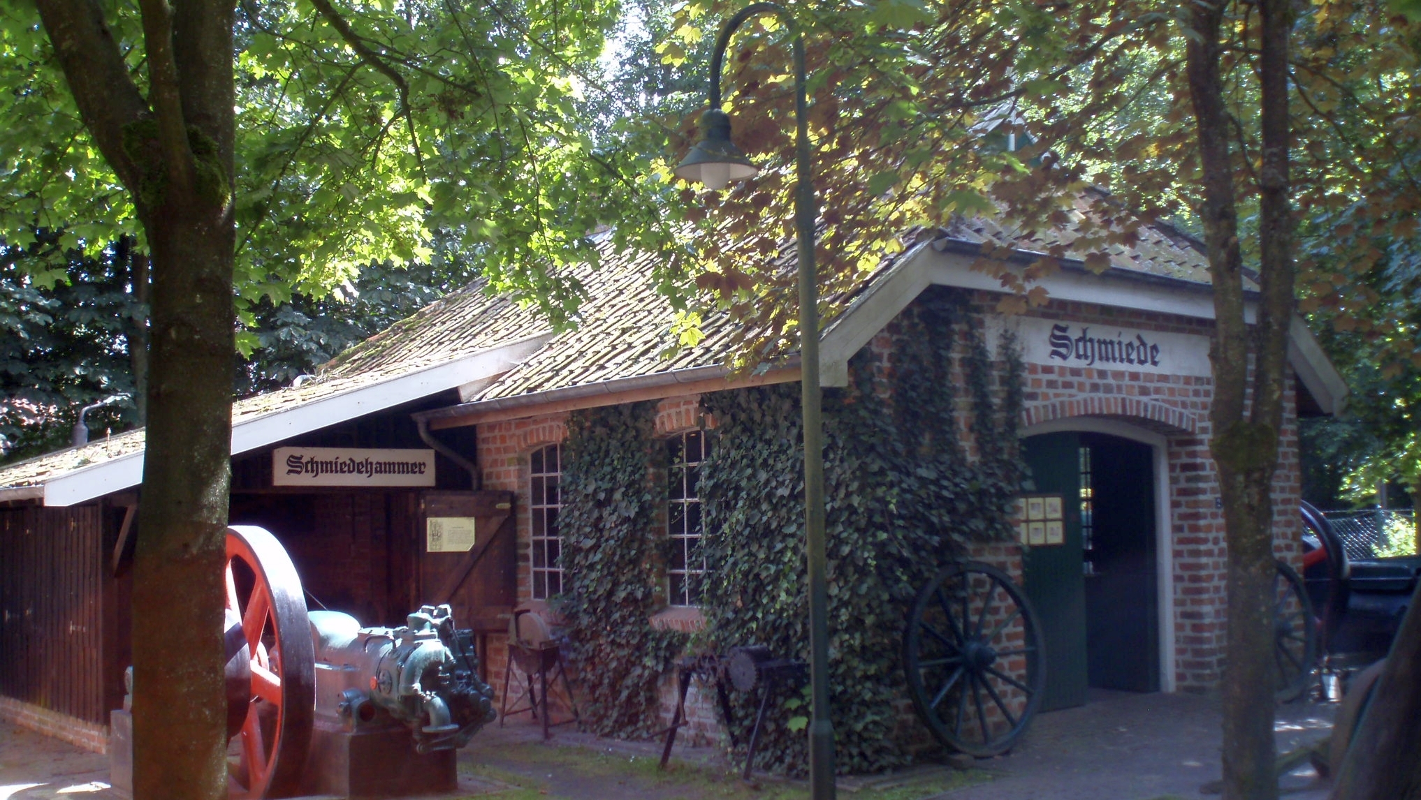 Rekonstruktion einer Dorfschmiede. Das Foto wurde aufgenommen im Dorfmuseum Münkeboe